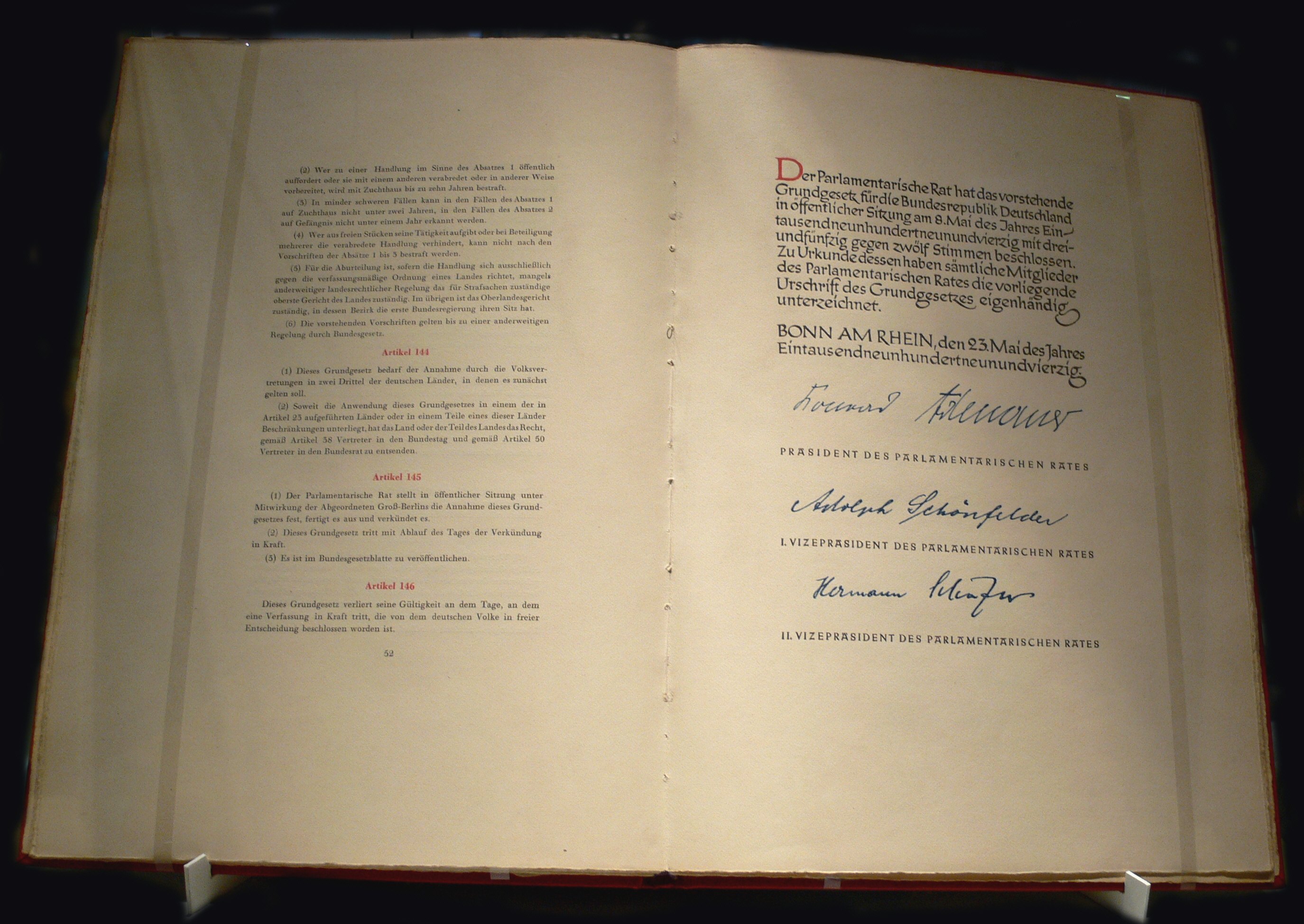 Faksimile des Grundgesetzes von 1949, wie es jedes Mitglied des Parlamentarischen Rates erhielt (Exemplar von Theodor Heuss im Theodor-Heuss-Haus Stuttgart; Eigentum Familienarchiv Heuss)